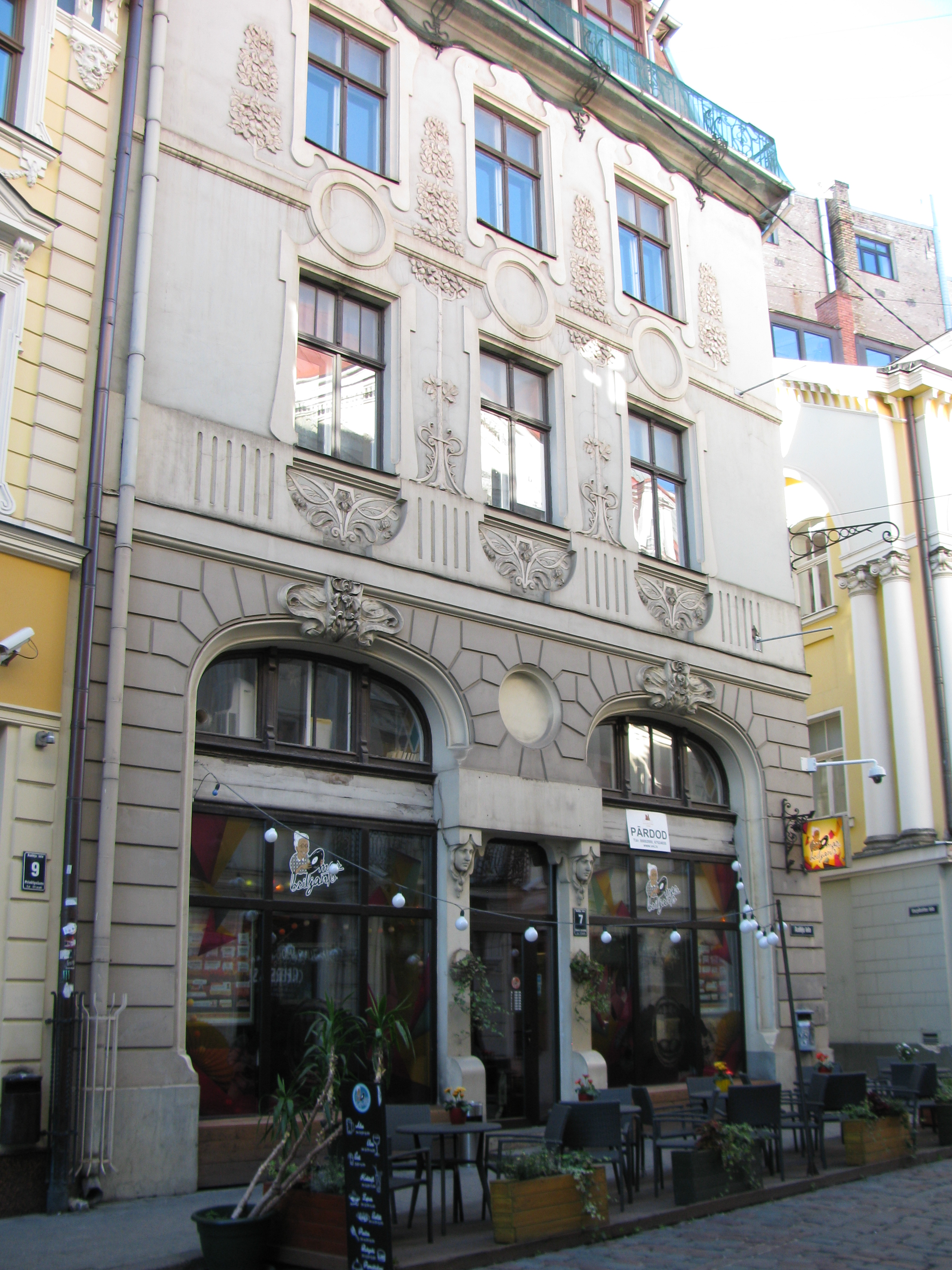 Dzīvojamo ēku komplekss, Rīga, Audēju iela 7; Audēju iela 9; Audēju iela 11